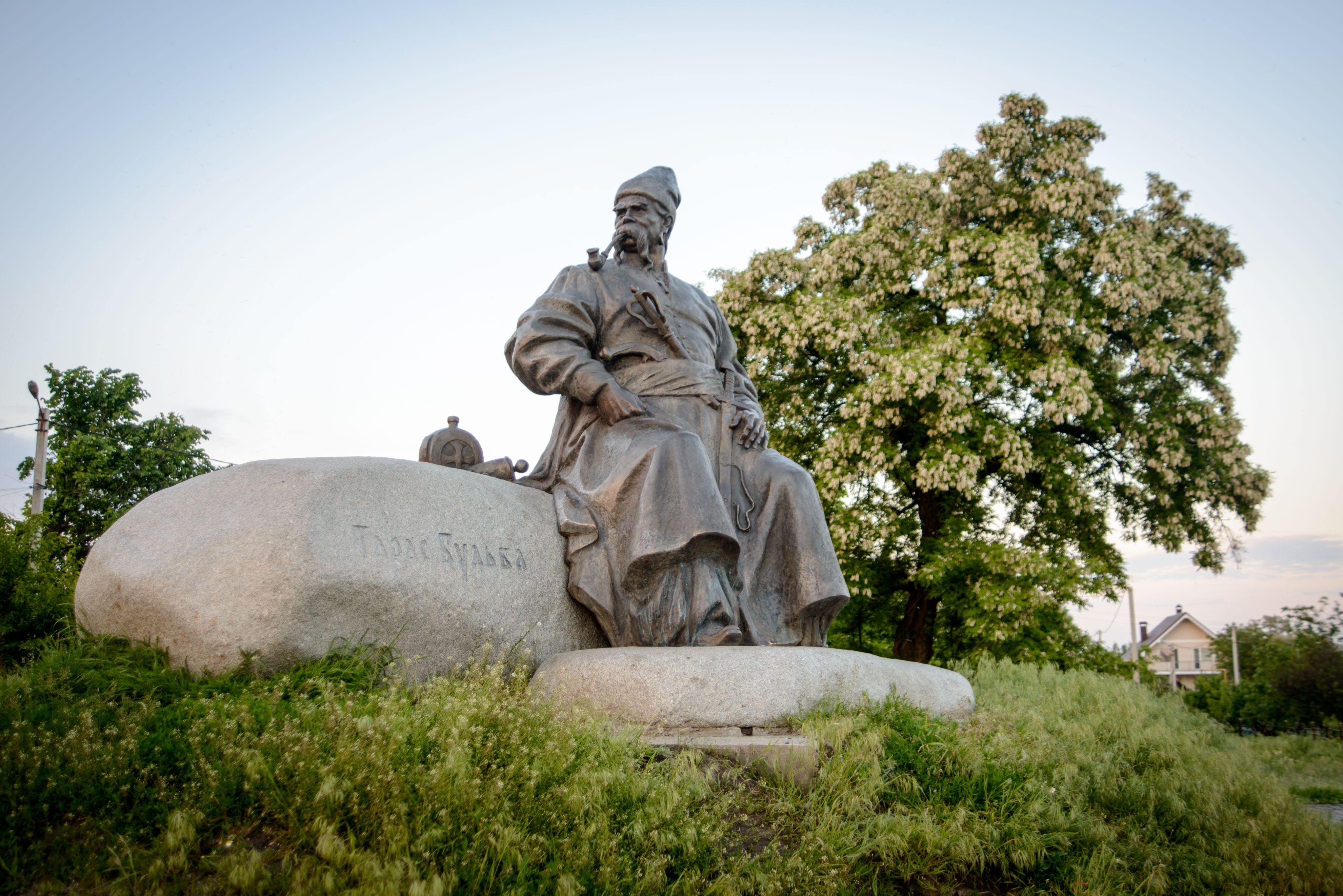 Пам’ятник Тарасу Бульбі, село Келеберда